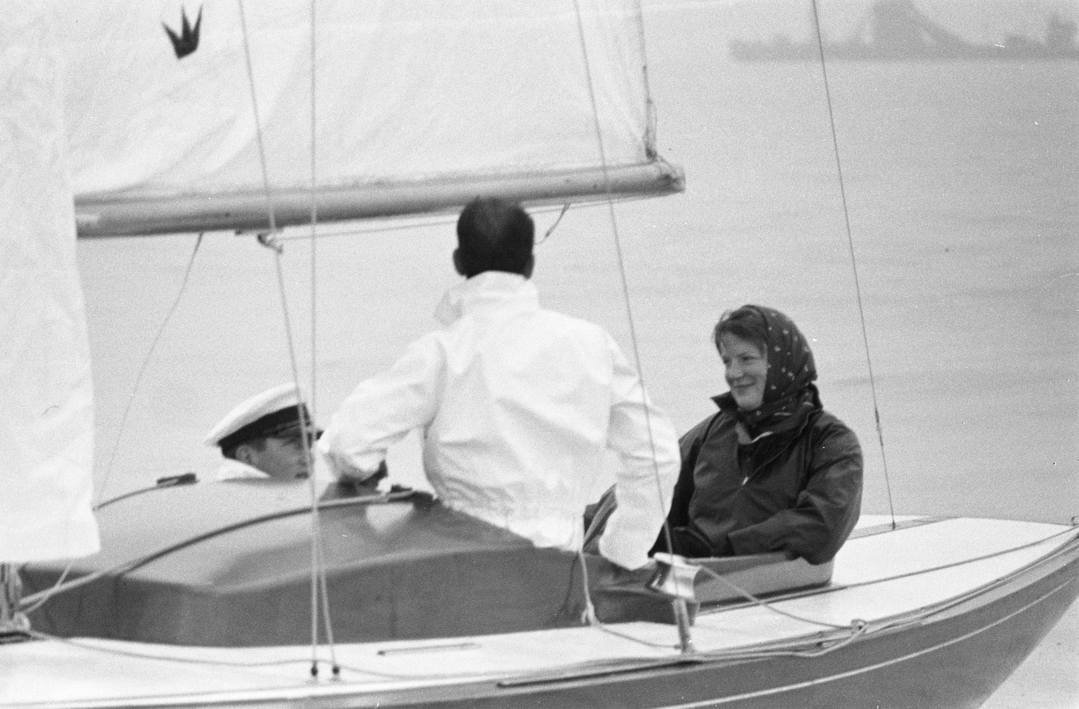 Collectie / Archief : Fotocollectie Anefo Reportage / Serie : [ onbekend ] Beschrijving : Zeilwedstrijden op het IJsselmeer, ladiesrace, Prinses Irene en Prins Constantijn tijdens het zeilen Datum : 7 juli 1960 Locatie : IJsselmeer Trefwoorden : ZEILWEDSTRIJDEN Persoonsnaam : Constantijn, prins, Irene, prinses Fotograaf : Pot, Harry / Anefo Auteursrechthebbende : Nationaal Archief Materiaalsoort : Negatief (zwart/wit) Nummer archiefinventaris : bekijk toegang 2.24.01.05 Bestanddeelnummer : 911-4087